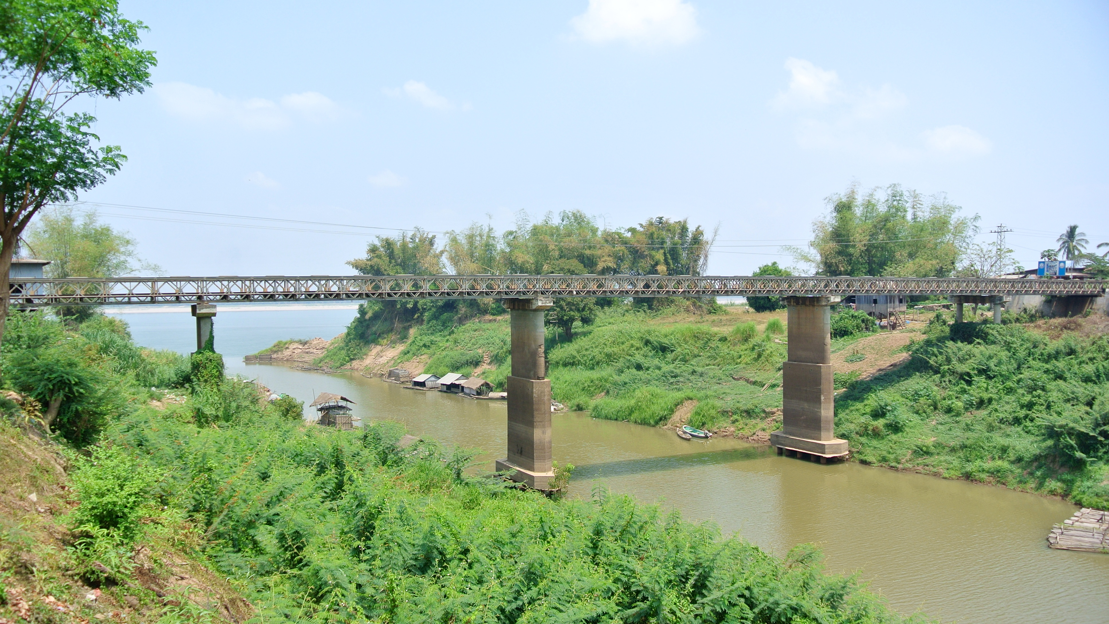 Chhlong